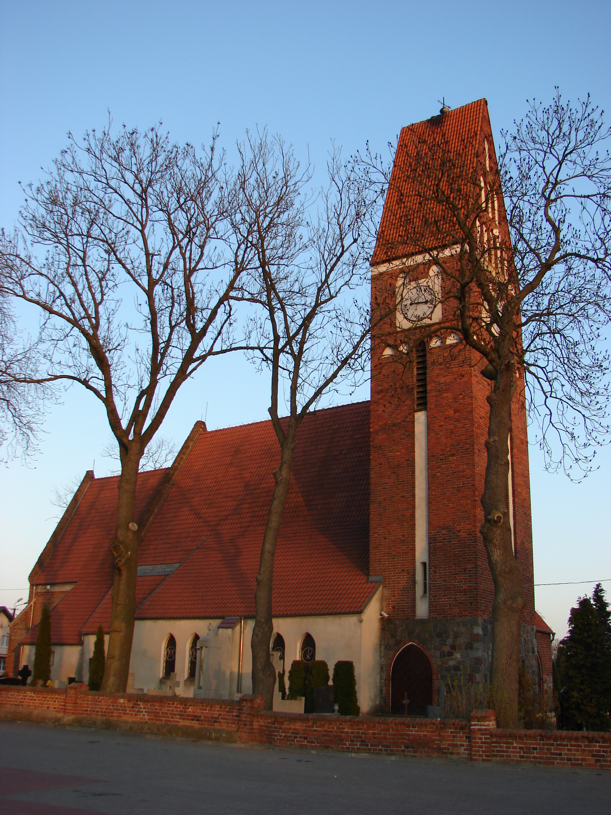 Papowo Toruńskie,Gmina Łysomice, within Toruń County, Kuyavian-Pomeranian Voivodeship. Parish church of Saint Nicholas, built before 1300.